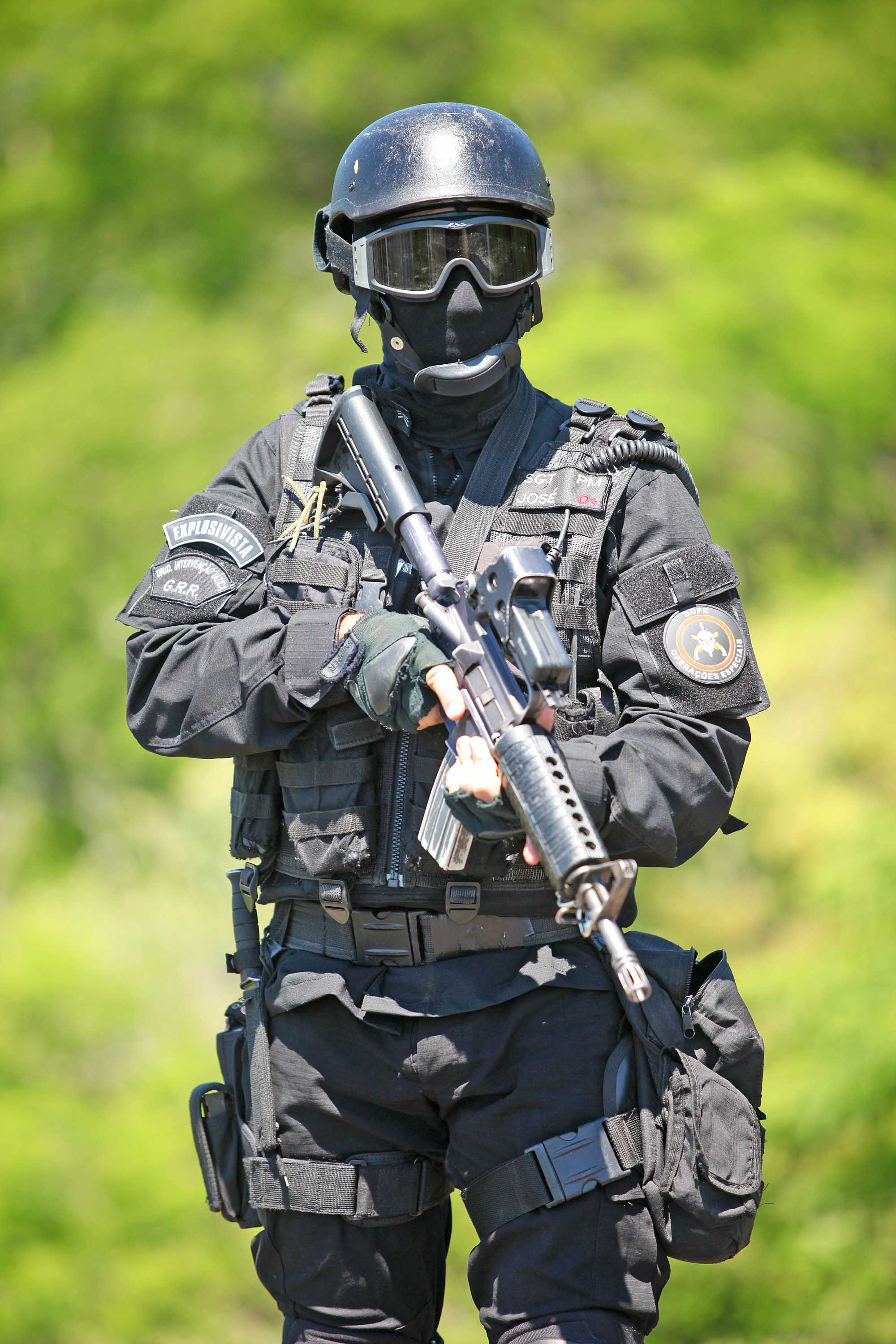 Em 2013, o Bope ganhará uniformes camuflados, preparados para serem mais resistentes à umidade e ao atrito.